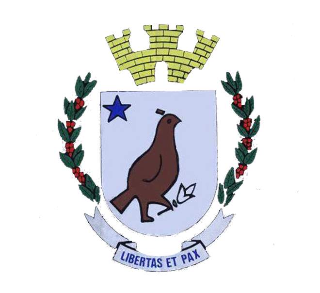 Bandeira do município de Uru - SP - Brasil.